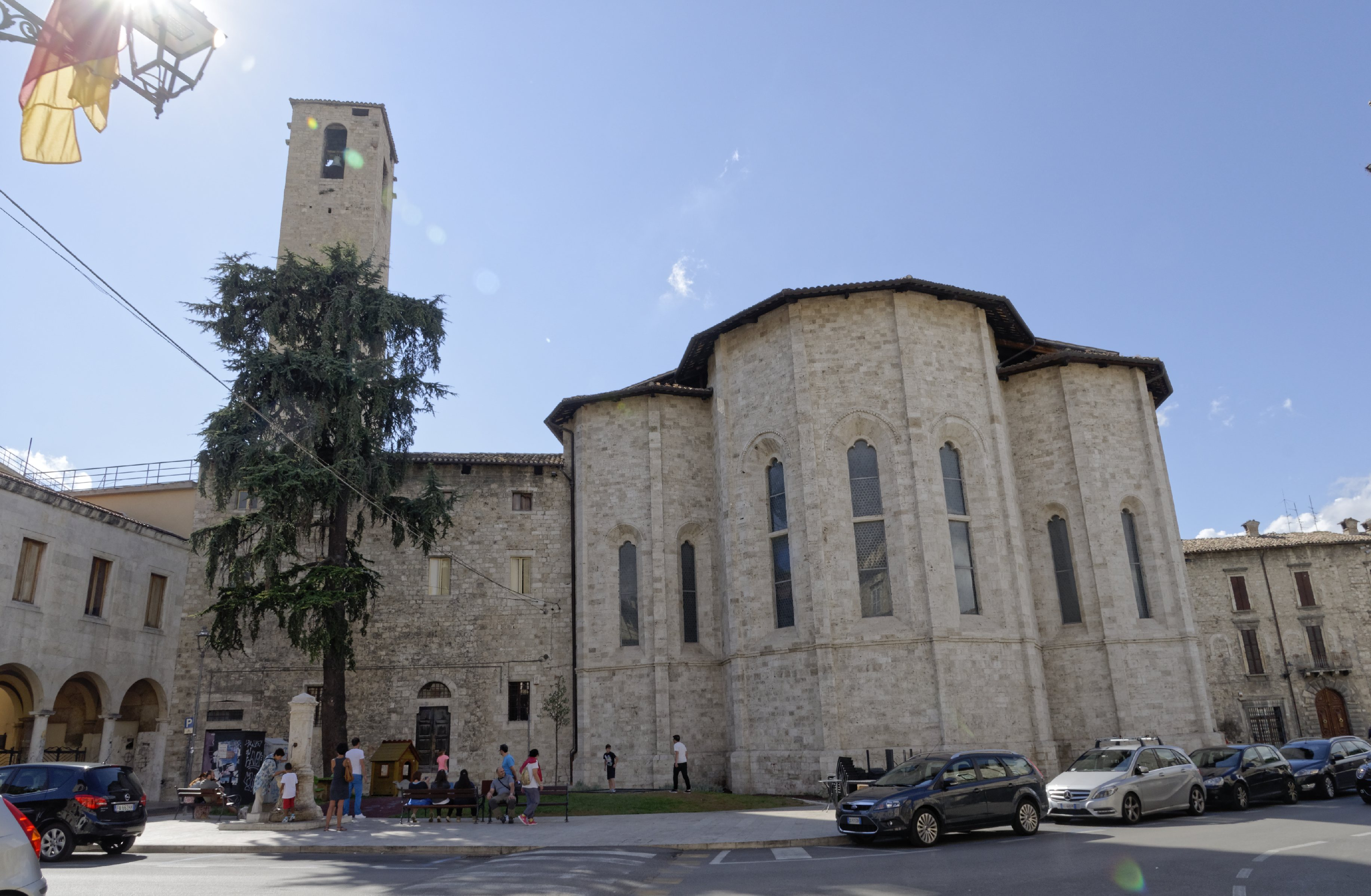 Ascoli Piceno 2015 Dieses Foto entstand in Zusammenarbeit mit Stadtbesichtigungen.de Die Seiten Stadtbesichtigungen.de, der dazugehörige Reise Blog sowie die Facebookseite: Stadtbesichtigungen Rom dürfen dieses Bild für Ihre Veröffentlichungen ohne den Hinweis auf Wikipedia, Commons bzw der Lizenz verwenden. Die Verantwortlichen habe von mir (Ra Boe) die Originaldaten zur freien Verfügung übermittelt bekommen.